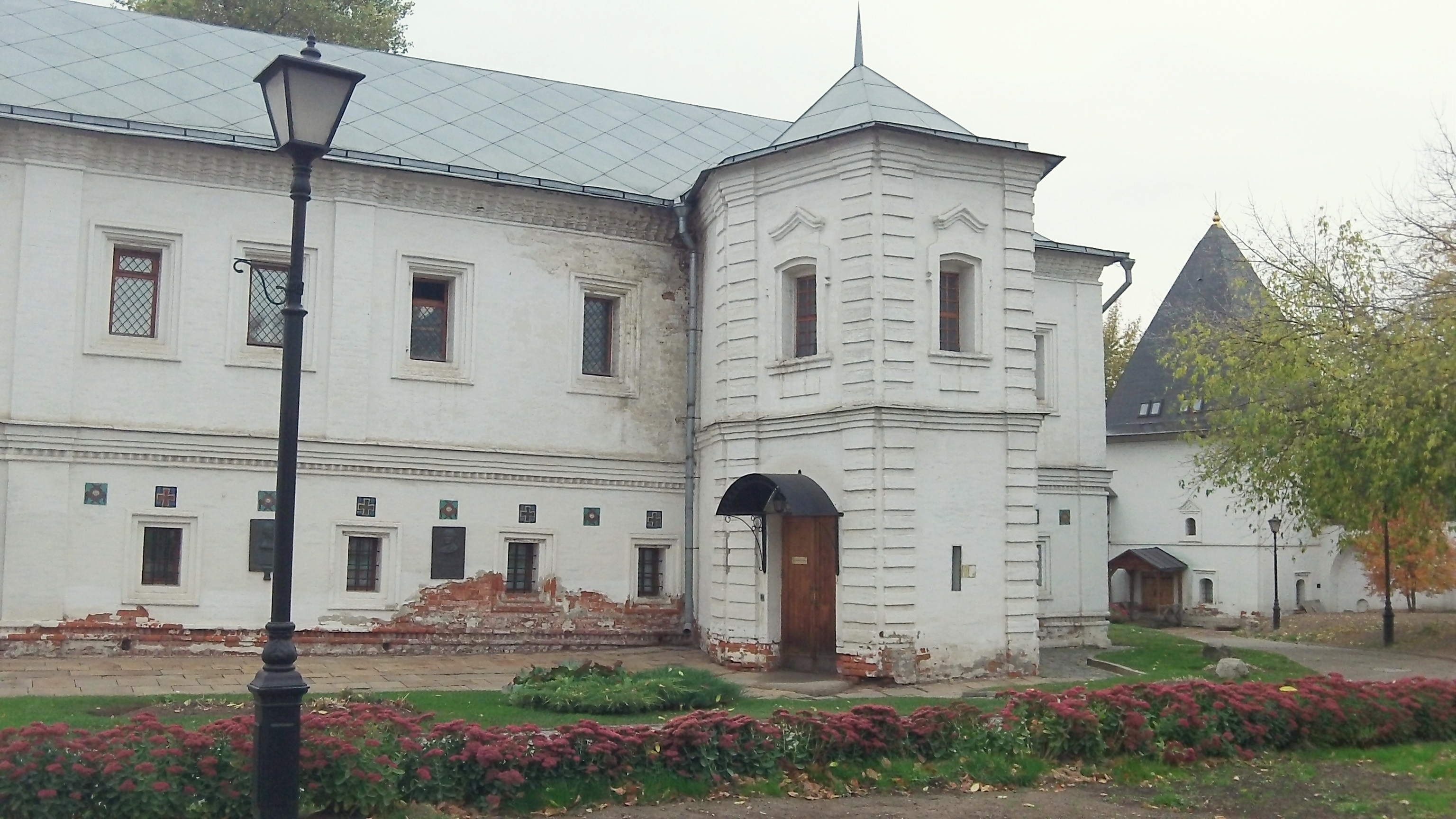 Ансамбль Андроникова монастыря (музей древнерусской культуры и искусства им. А. Рублева) (Москва и Московская область, Москва, Андроньевская площадь, 10)